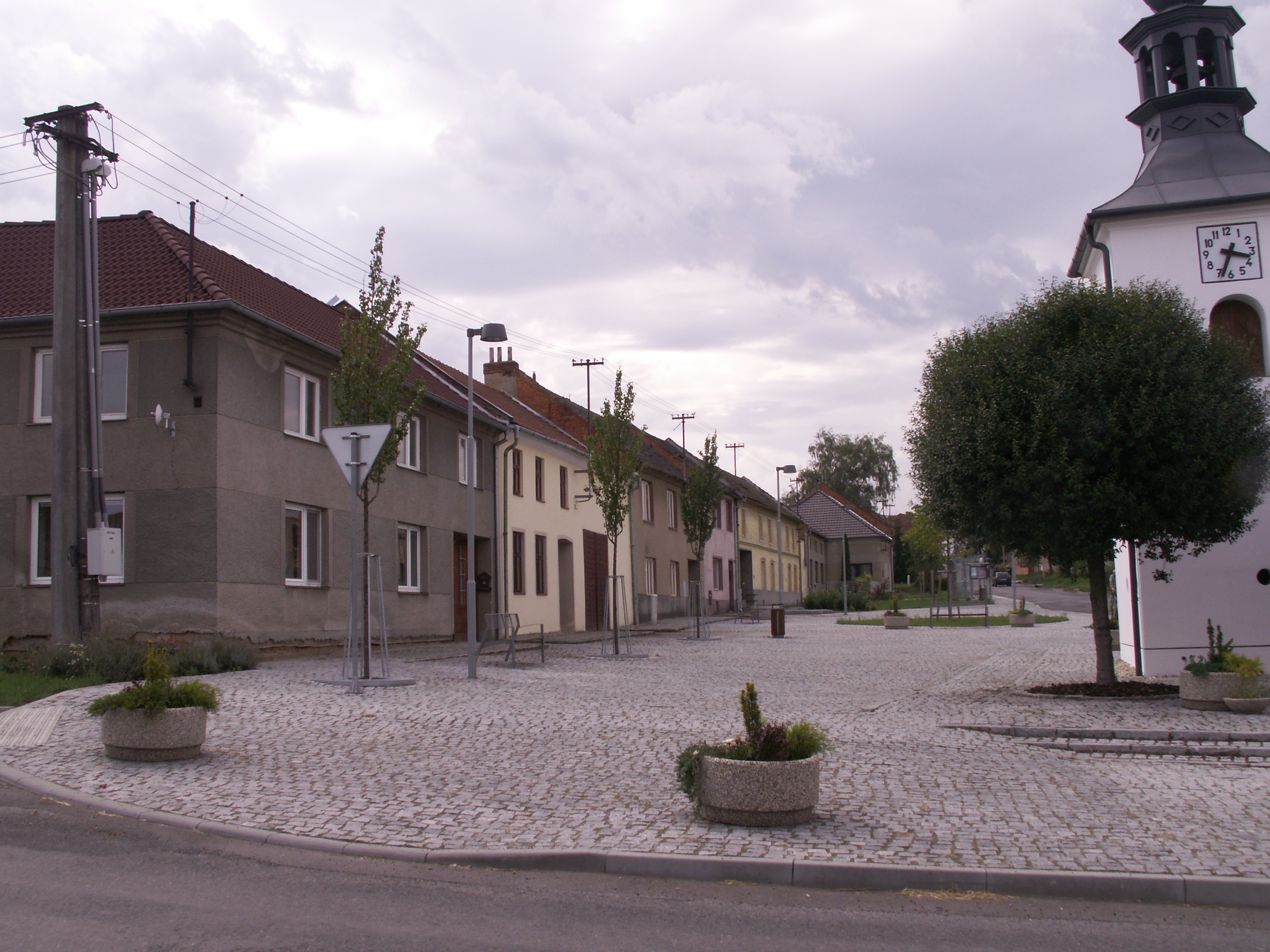 náves v Lešanech (okres Prostějov) po obnově v roce 2013